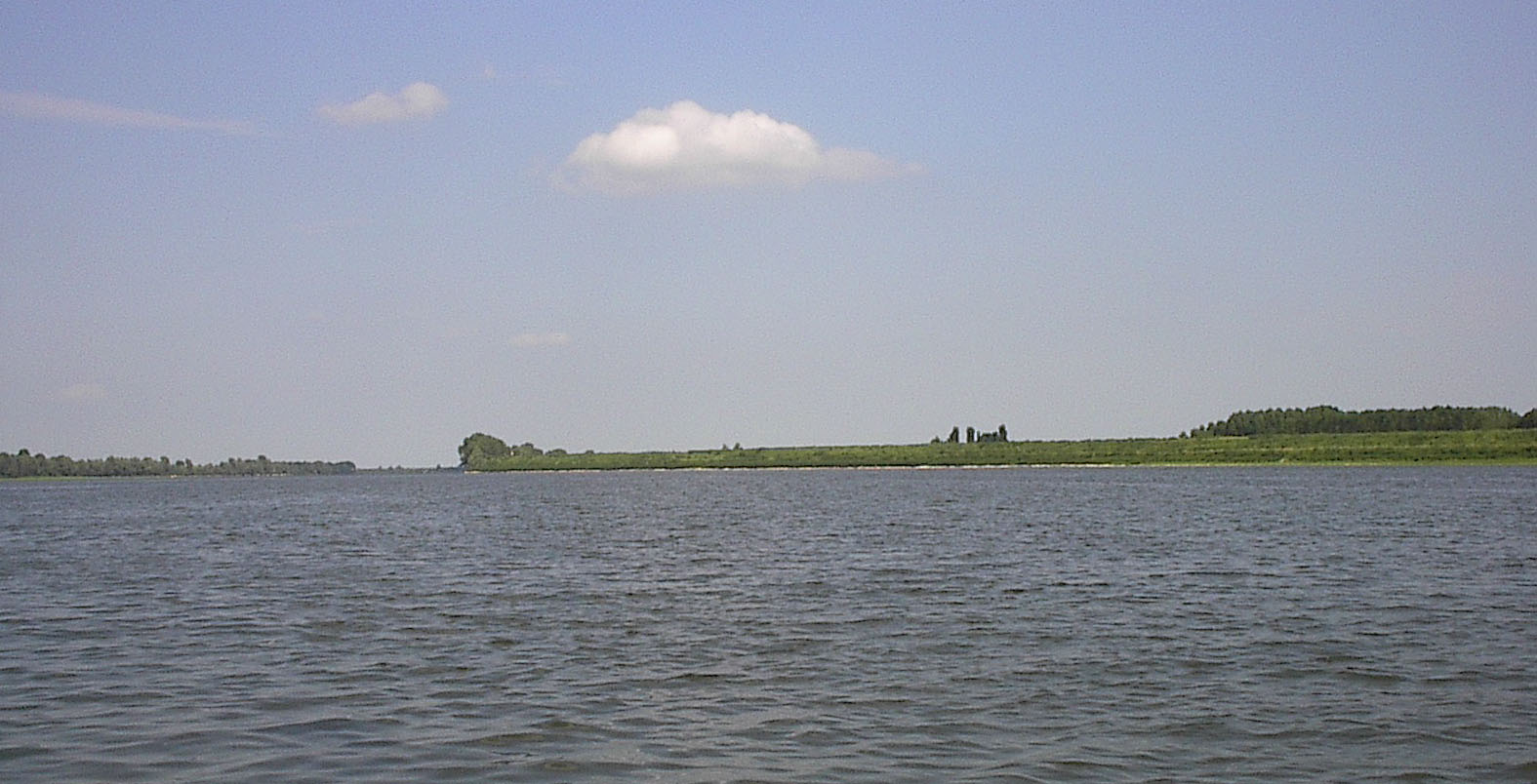 tratto del fiume Po fotografato dal porticciolo di Crespino, in provincia di Rovigo